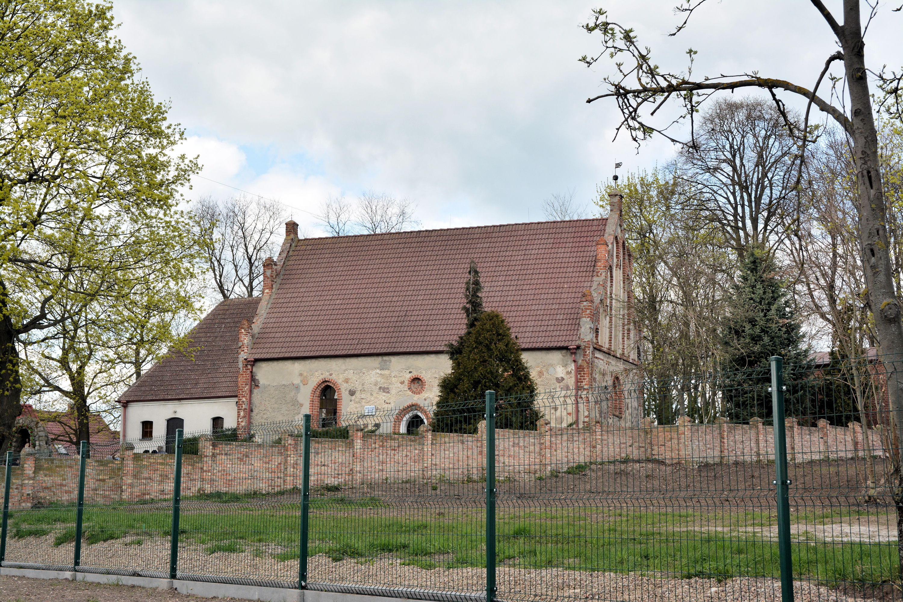 Lubiatowo - rzymskokatolicki kościół filialny p.w. Matki Boskiej Nieustającej Pomocy, XV/XVI